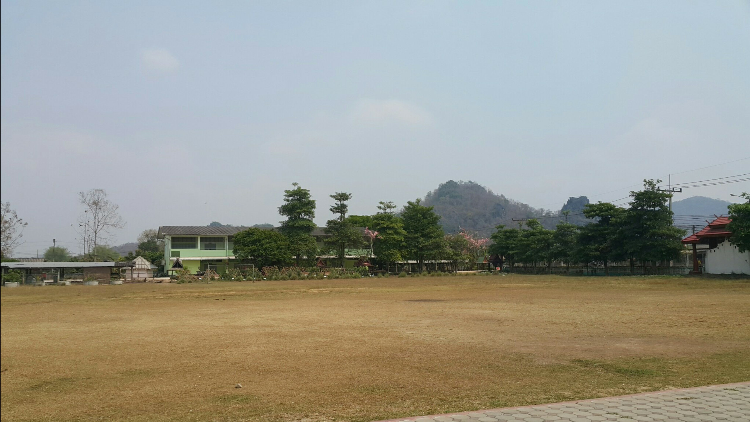 โรงเรียนเทศบาล 2 (สามัคคีราษฎร์รังสรรค์) ตำบลป่าแงะ อำเภอป่าแดด จังหวัดเชียงราย